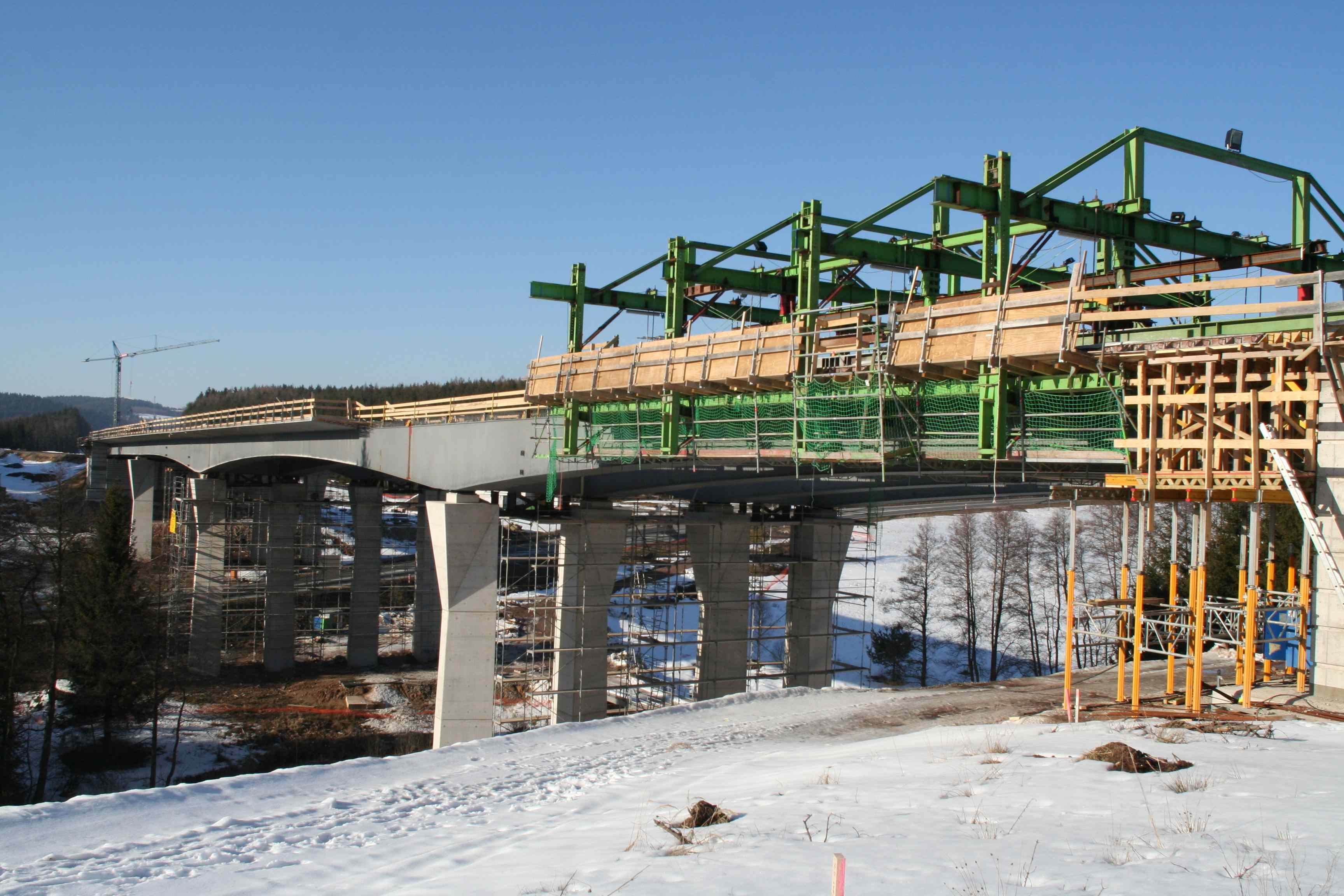 Talbrücke Wiedersbach Bundesautobahn A73 zw. Eisfeld und SchleusingenSchalwagen für Stahlverbundbrücke